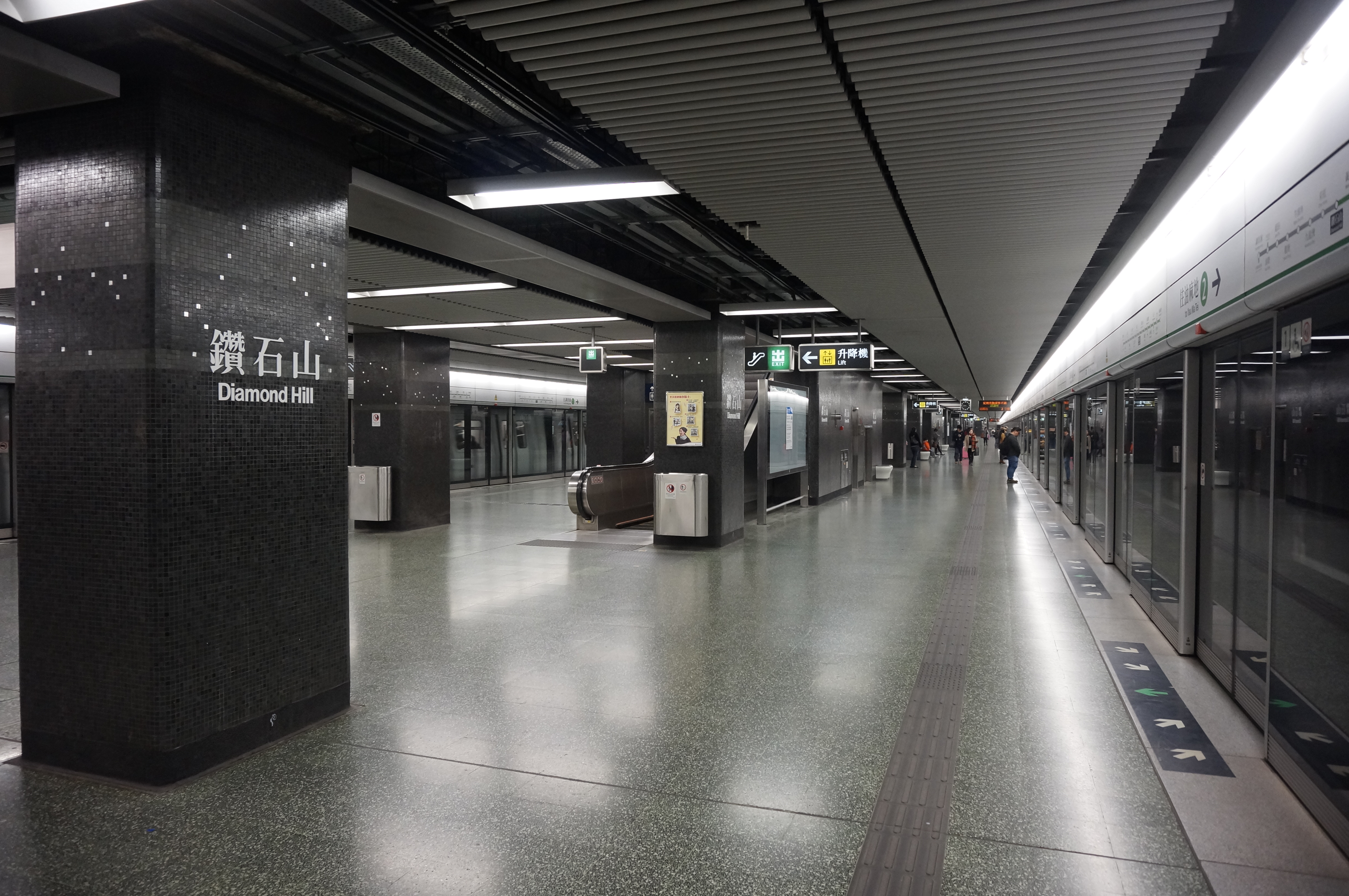 港鐵鑽石山站月台